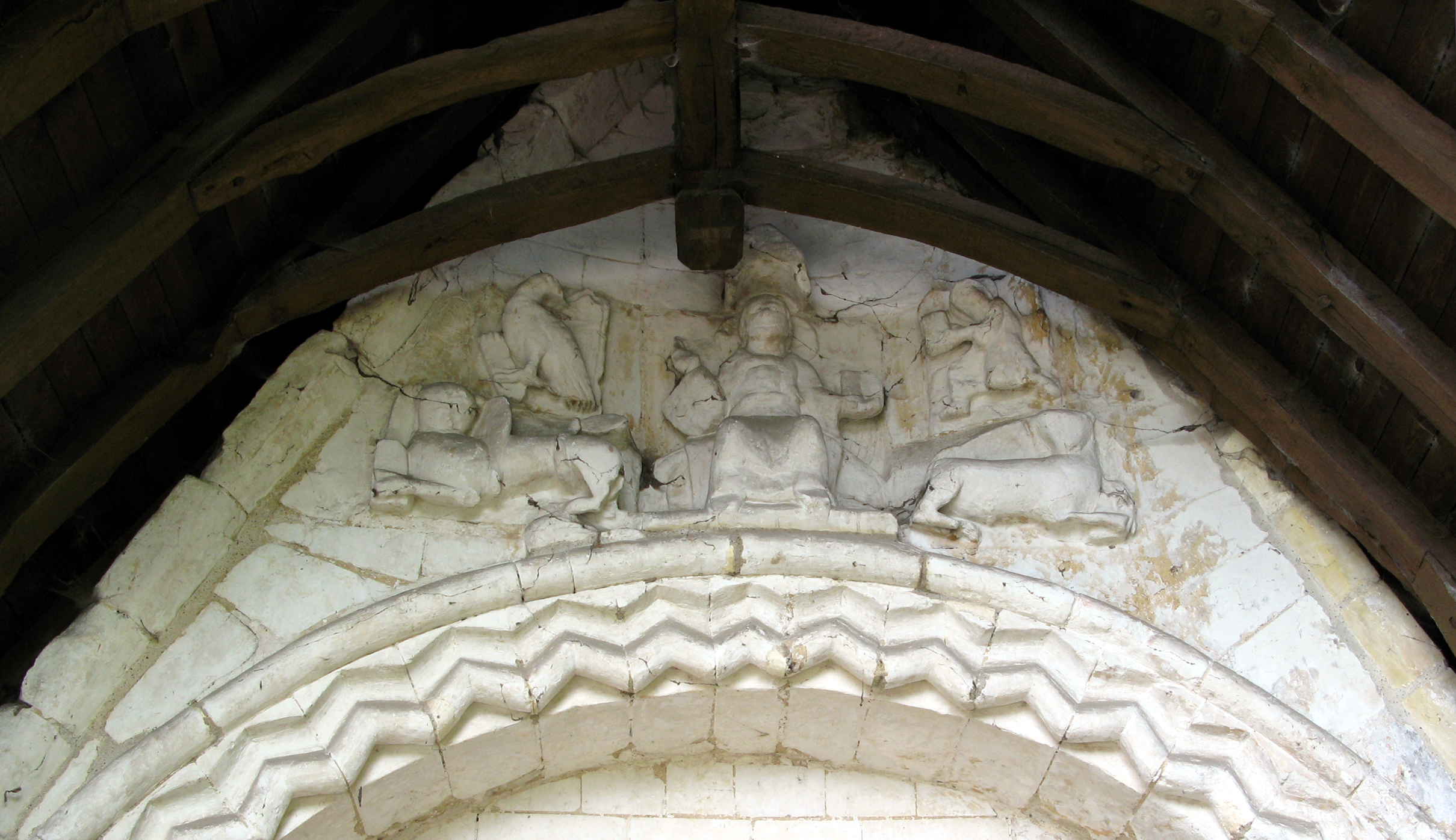 Mareuil-Caubert (Somme, France) - Le tympan de l'église. Jésus, assis, est entouré de la représentation symbolique des 4 Évangiles.